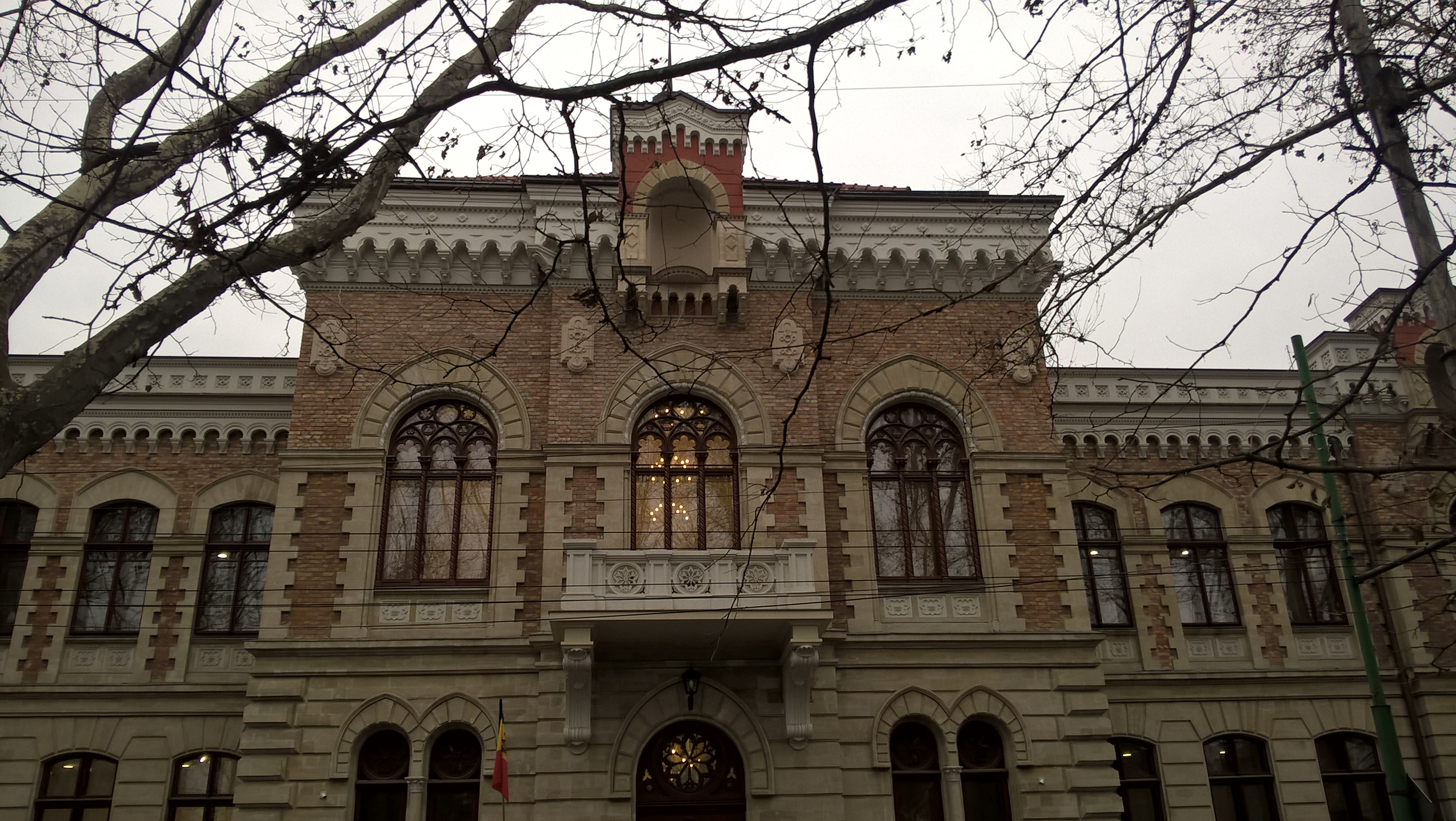 Dawne II gimnazjum żeńskie księżnej Dadiani w Kiszyniowie